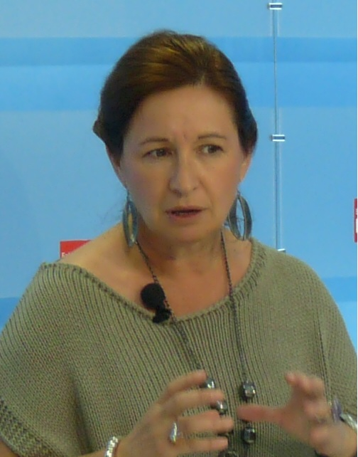 Debate virtual sobre Innovación, Nueva Economía y Actividades Emergentes con la Vicepresidenta II de la Junta, María Dolores Aguilar